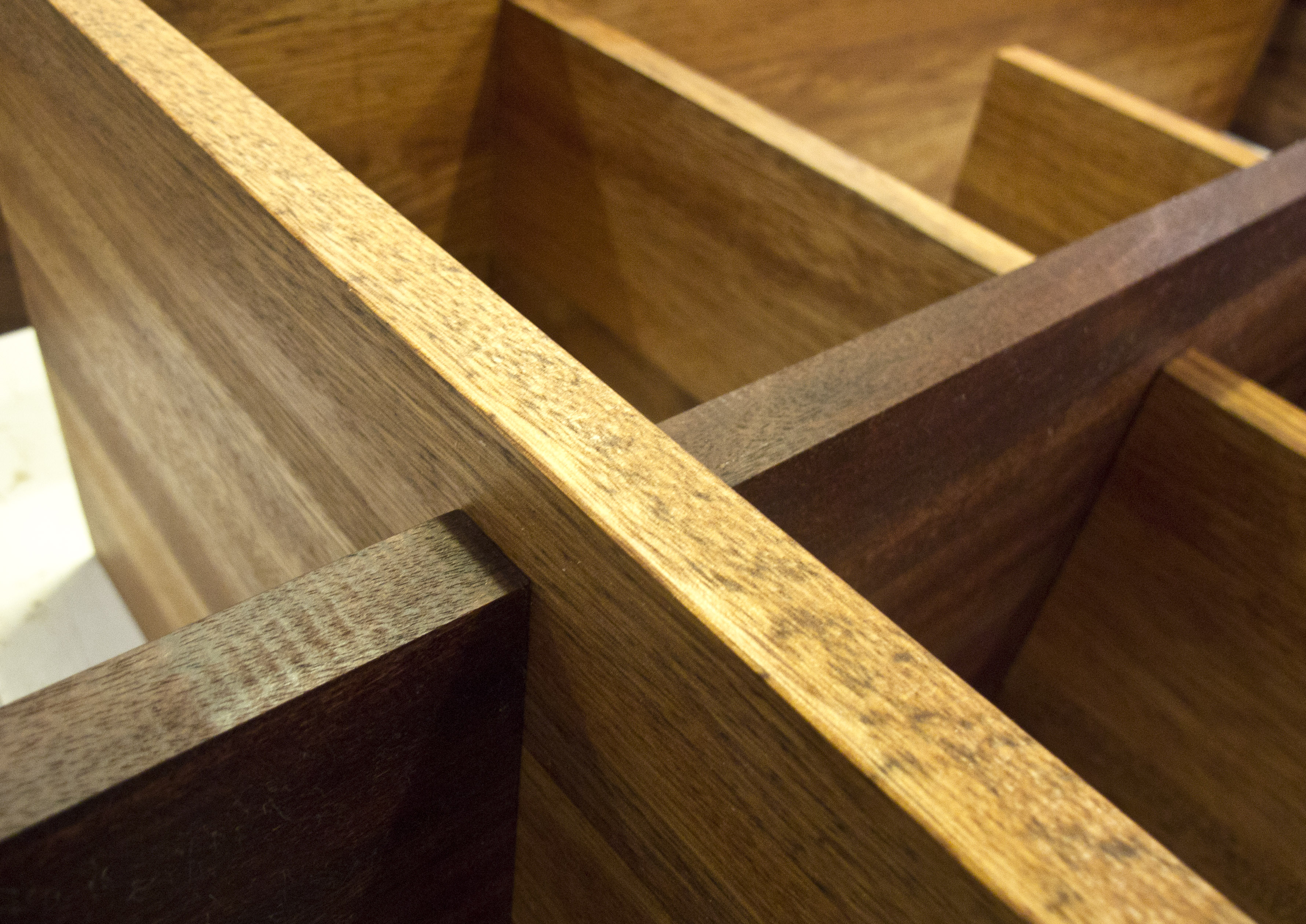 Nærbillede af Steen Highams vægobjekt. Santa Maria (Calophyllum brasiliense Camb) og Rosita (Hyeronima alchorneoides Allem)